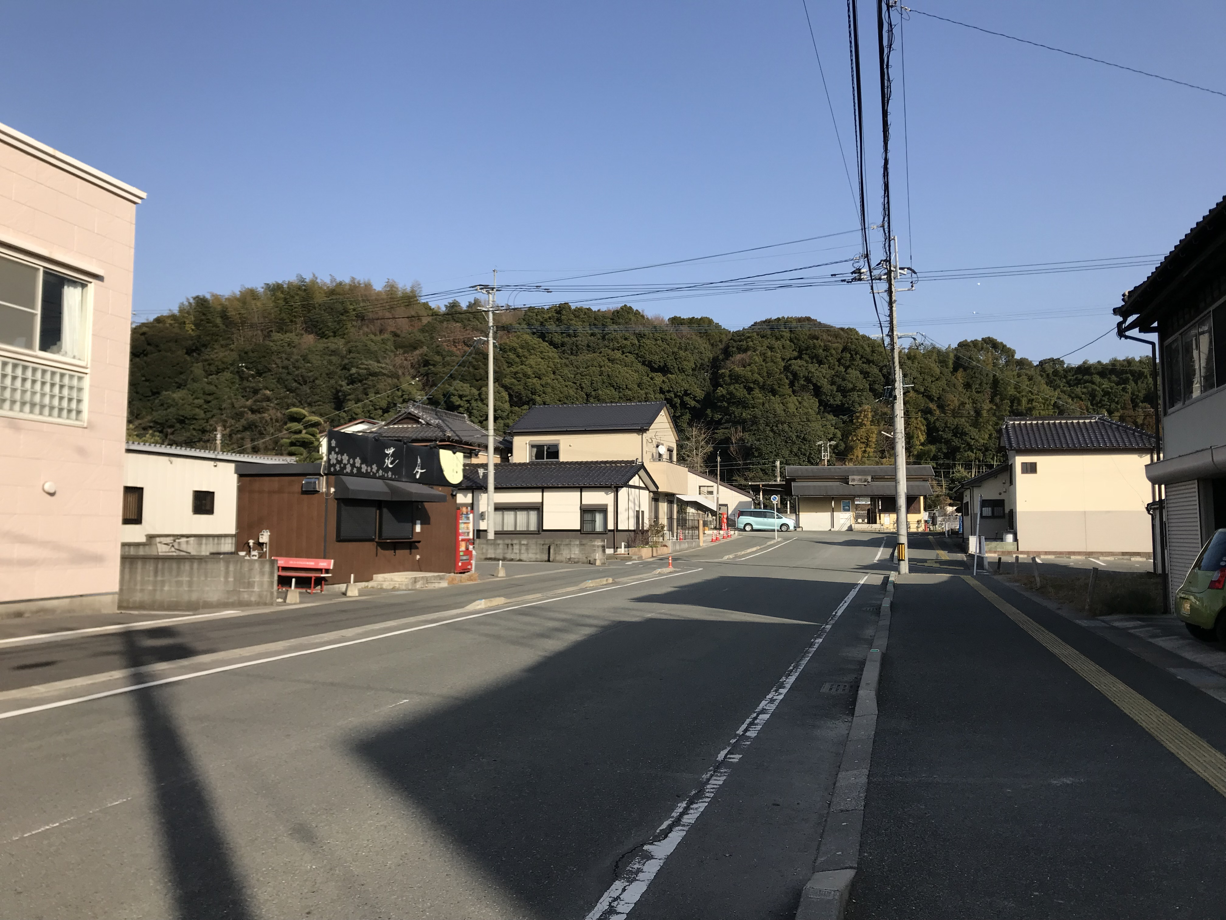 渡瀬駅の遠景